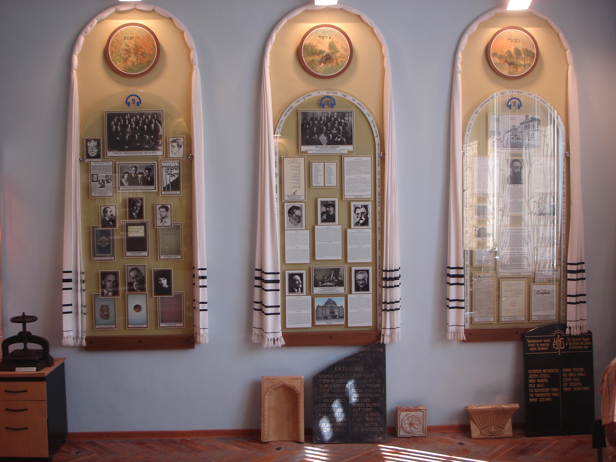 фрагмент експозиції музею